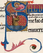 Saltiri anglocatalà (Biblioteca Nacional de França, Lat. 8846), detall del foli 117 recto amb la lletra S inicial de Salvum, del Salm 69:2 "Salvum me fac, Deus, quoniam intraverunt aquæ usque ad animam meam" (Salva'm, Déu meu, l'aigua m'arriba al coll).